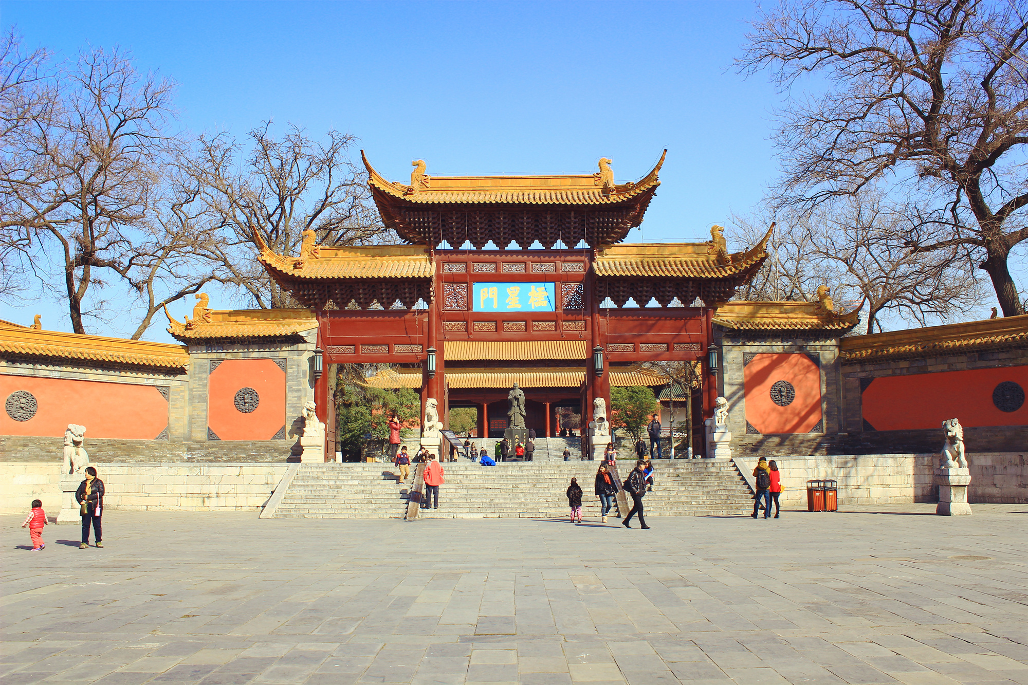 朝天宫棂星门